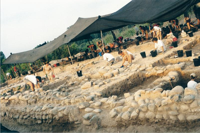 The Yarmukian Culture is a Neolithic culture of the ancient Levant. It was the first culture in Prehistoric Israel and one of the oldest in the Levant to make use of pottery. The Yarmukian derives its name from the Yarmouk River which flows near its type site at Sha'ar HaGolan, a kibbutz at the foot of the Golan Heights. The pictures are fromYosef Garfinkel excavations taken between 1989-1990 & 1998-2004 התרבות הירמוכית היא תרבות מהתקופה הניאוליתית הקרמית שמרבית שרידיה נתגלו באיזור שדות שער הגולן, והיא קיבלה את שמה על שם נהר הירמוך הזורם בסמוך. התמונת הן מחפירות שנערכו בשער הגולן על ידי הארכאולוגי יוסי גרפינקל מהאוניברסיטה העברית . נערכו 2 עונות חפירה 1990-1989, ו 1996-2004. חפירות 1998